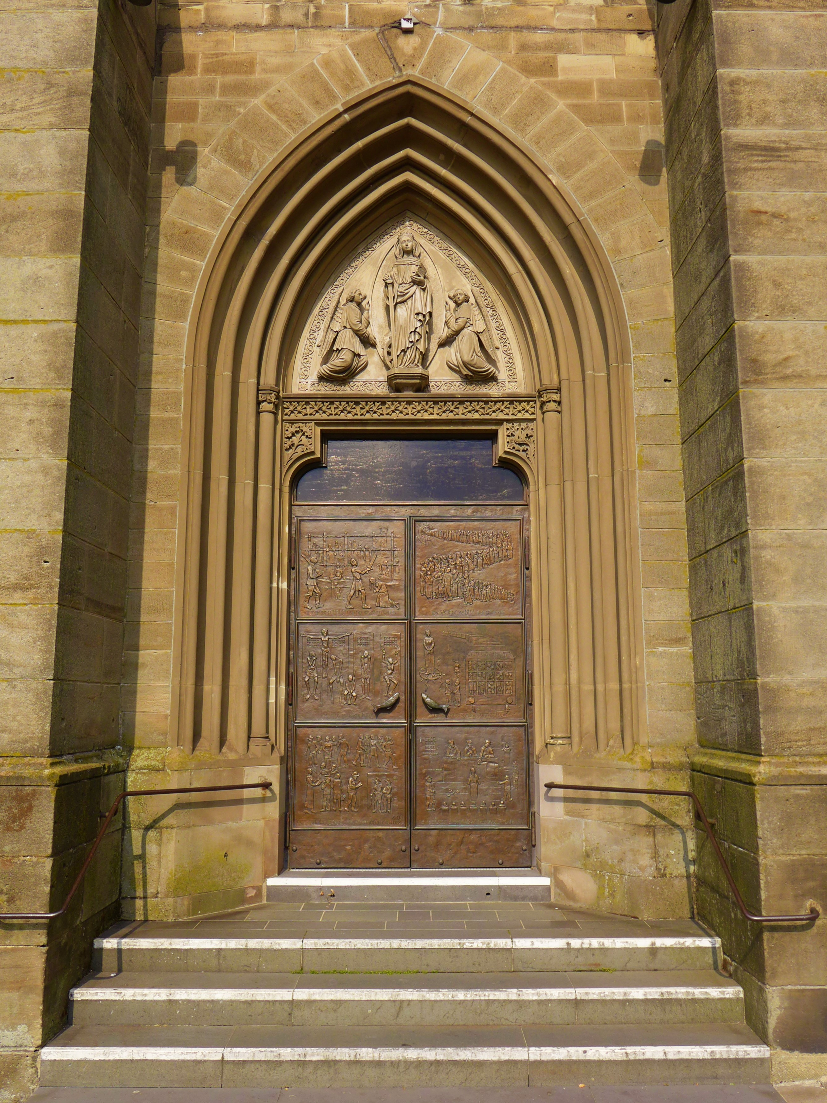 St. Katharina (Wallerfangen), Turmportal